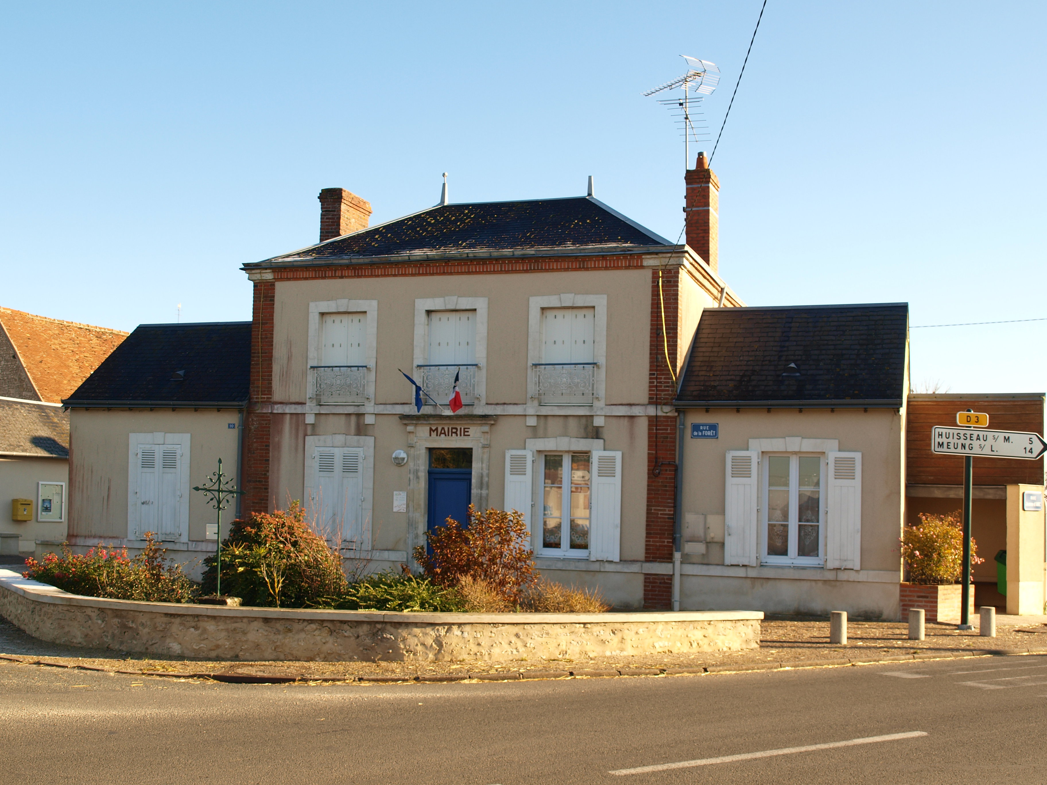 Rozières-en-Beauce (Loiret, France) ; mairie